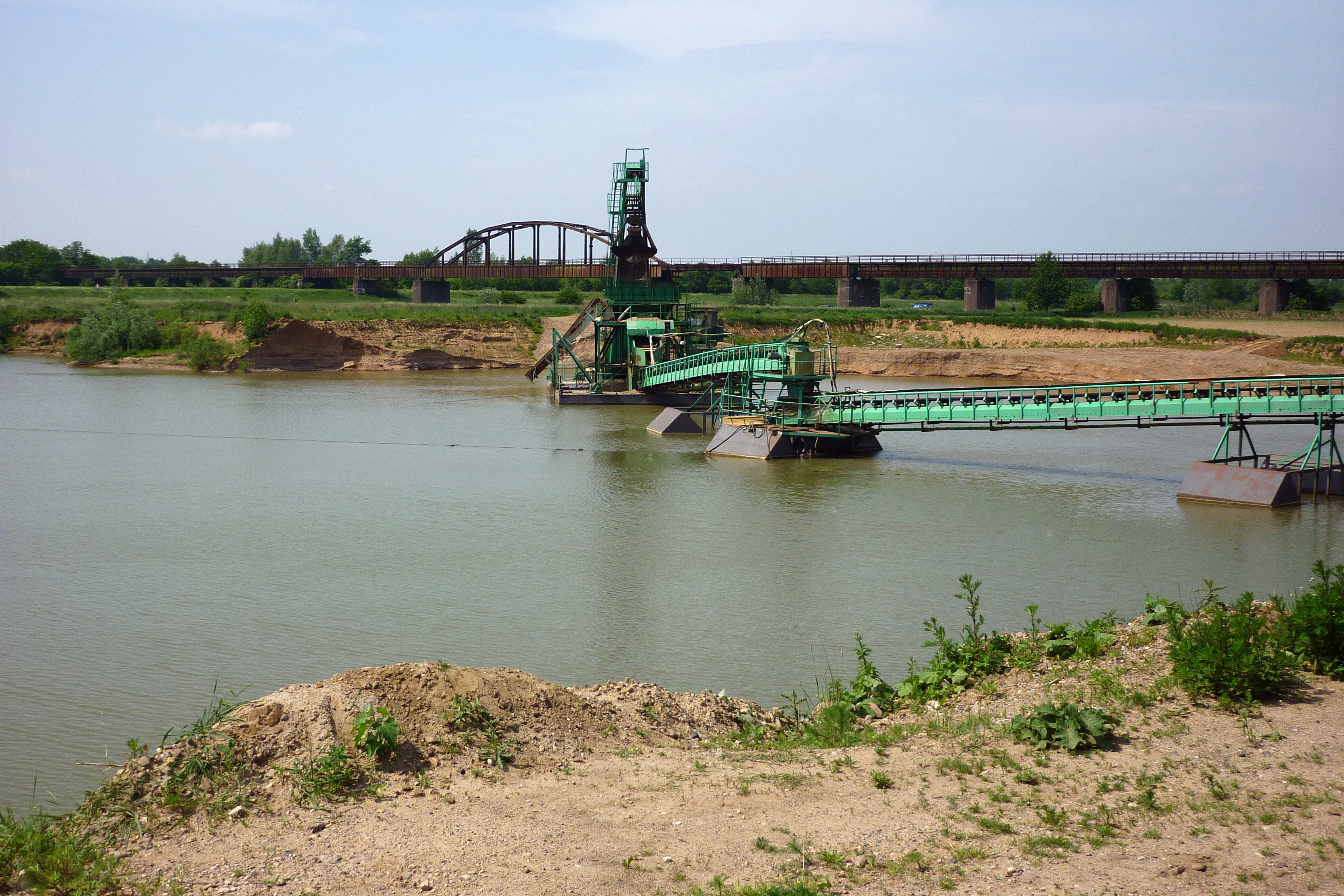 Porta Westfalica. Kiesbagger und alte Eisenbahnbrücke nahe der Weser.